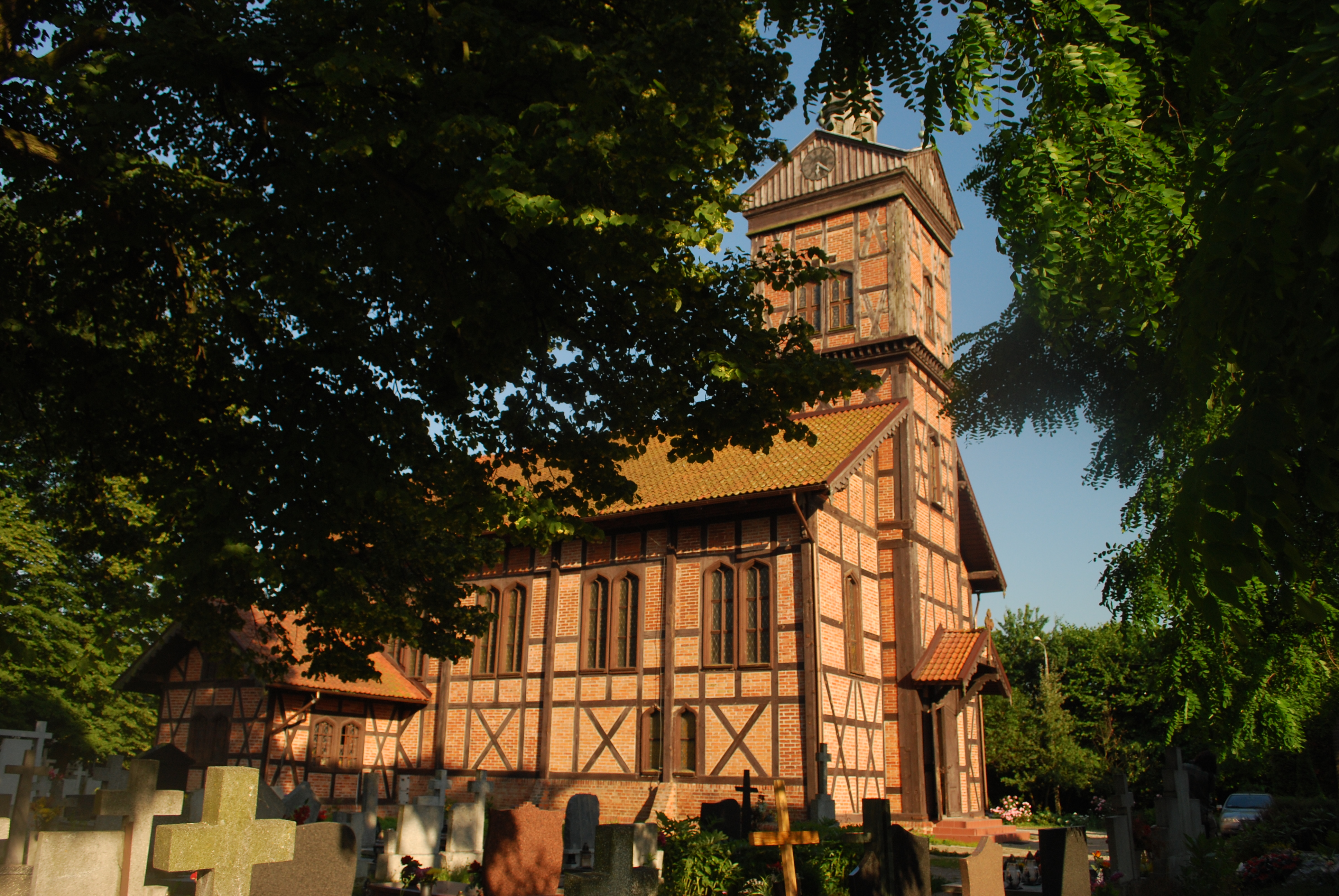 Kościół Marzęcinie.